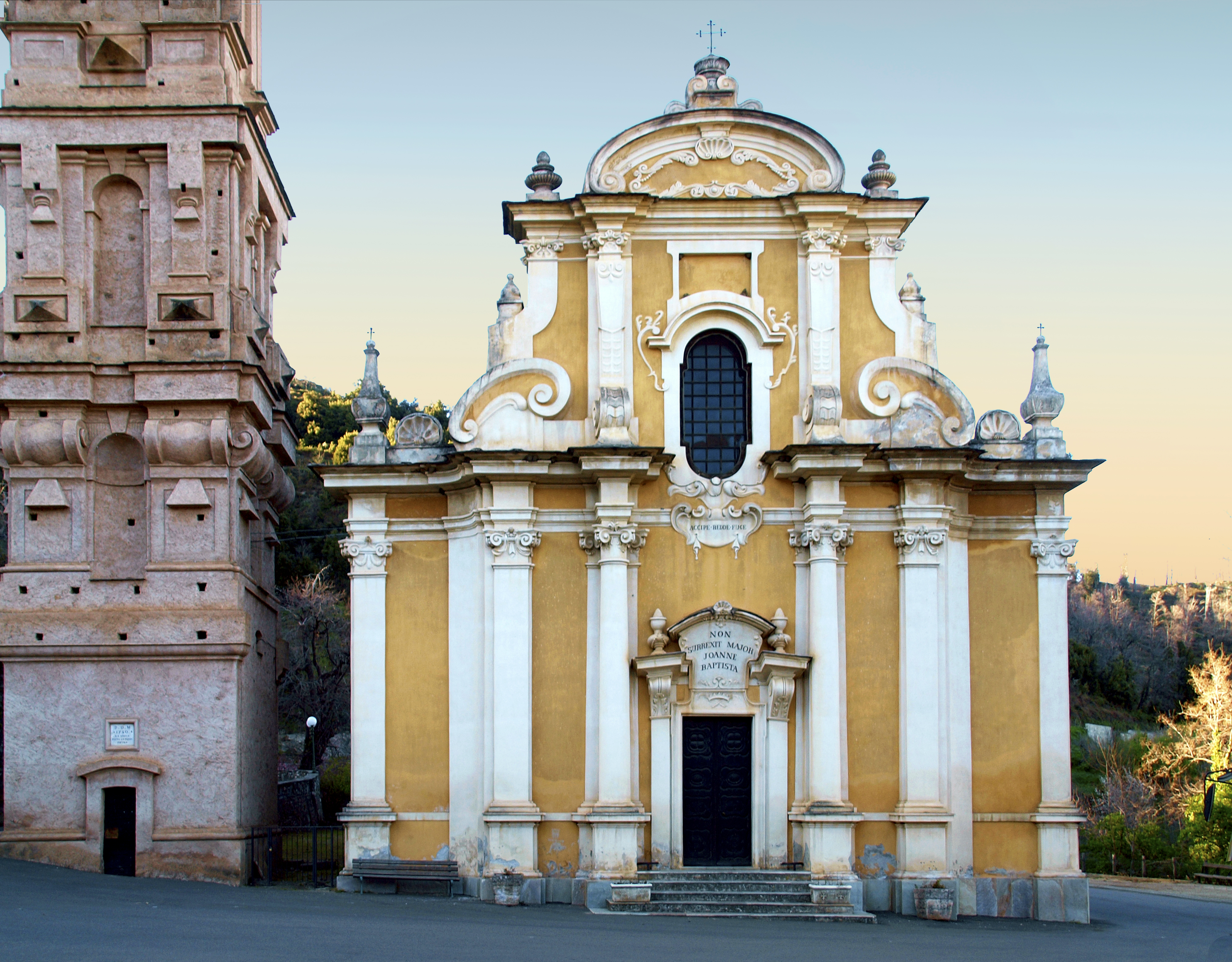 La Porta, Castagniccia (Corse) - Façade occidentale de l'église Saint-Jean-Baptiste (MH)